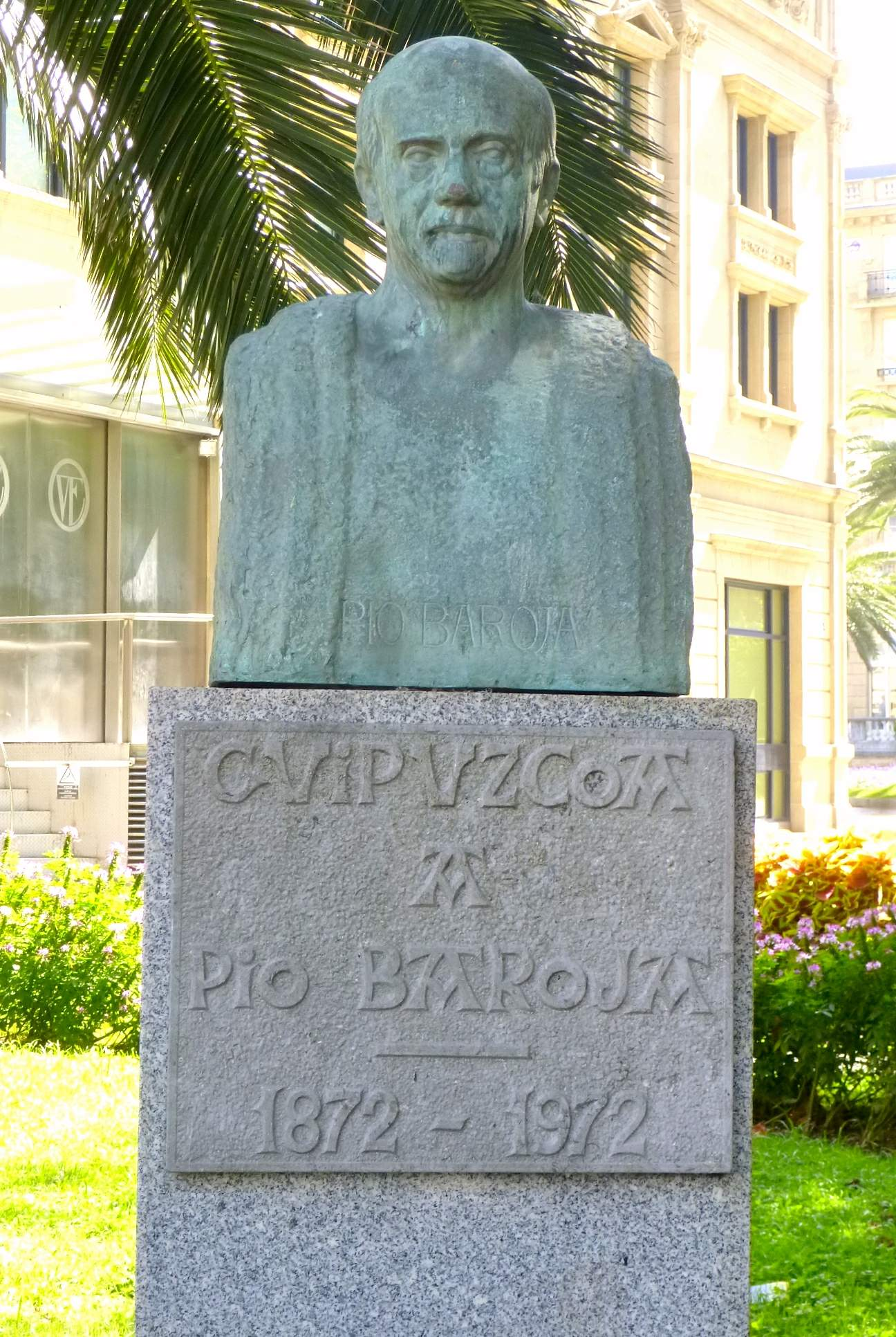 San Sebastián - Jardines de Reina Regente, Monumento a Pío Baroja